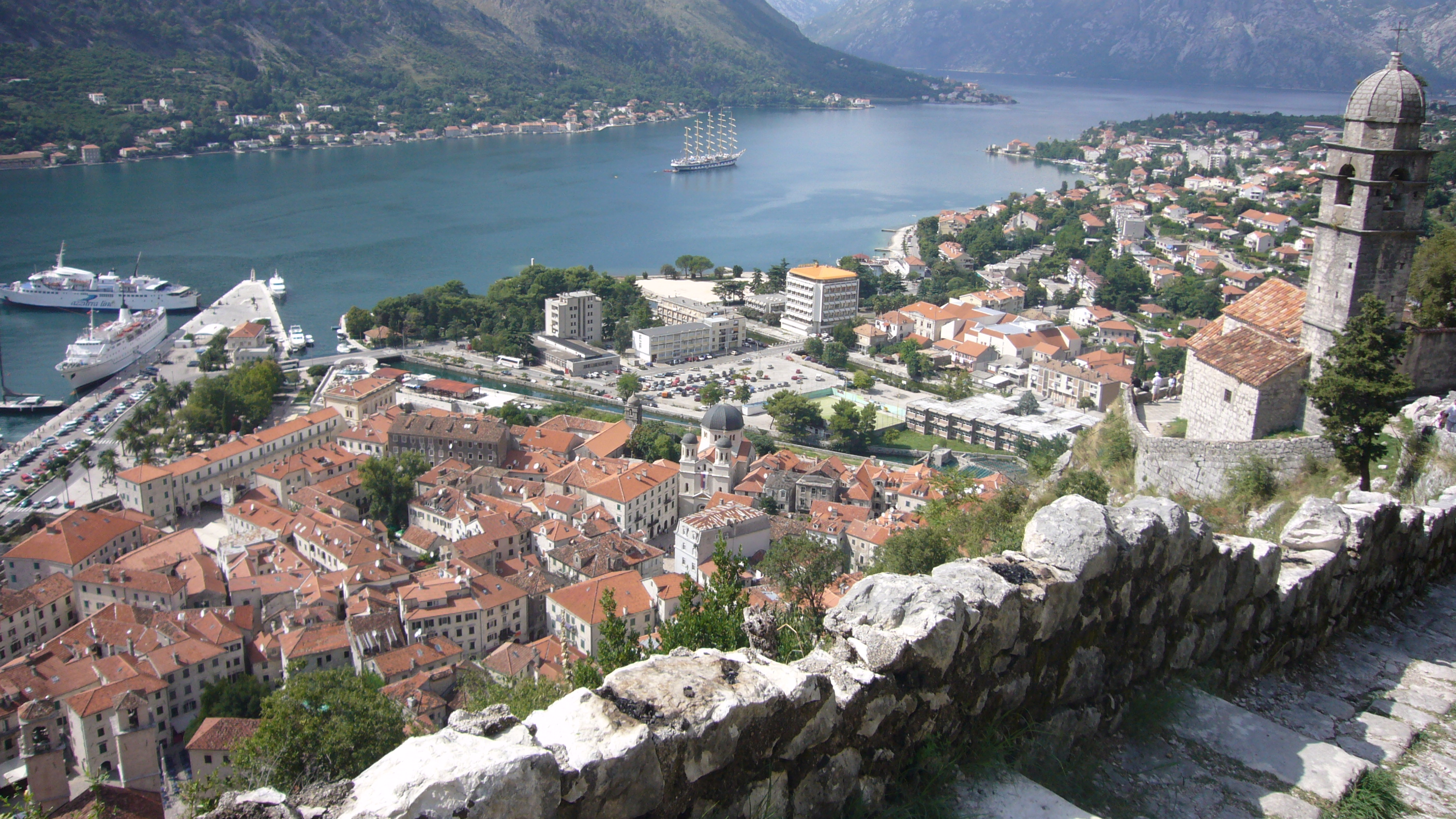 Kotor, Patrimonio da Humanidade.